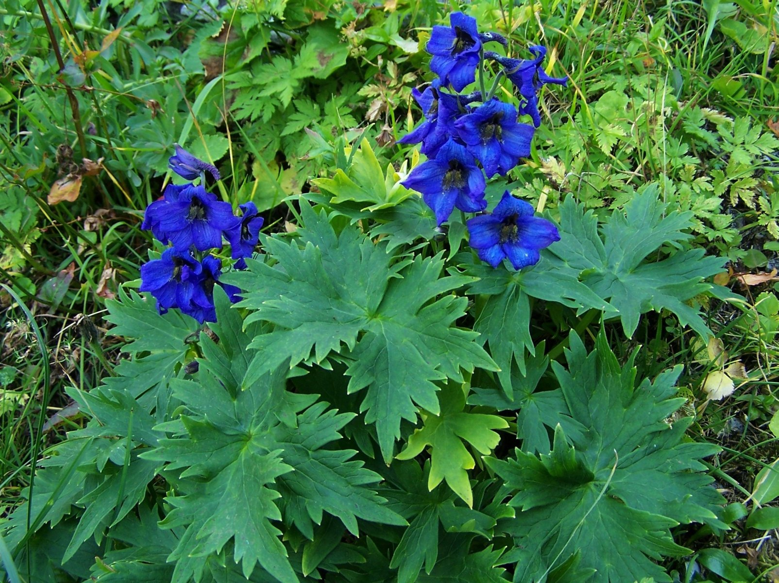 Delphinium oxysepalum (pl. ostróżka tatrzańska), habitat: Tatra Mountains, Czerwone Wierchy, Kobylarzowy Żleb